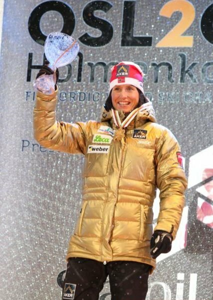 Marit Bjørgen podczas ceremonii medalowej po biegu indywidualnym kobiet na 15 kilometrów w ramach Mistrzostw Świata w Narciarstwie Klasycznym 2011 w Oslo.